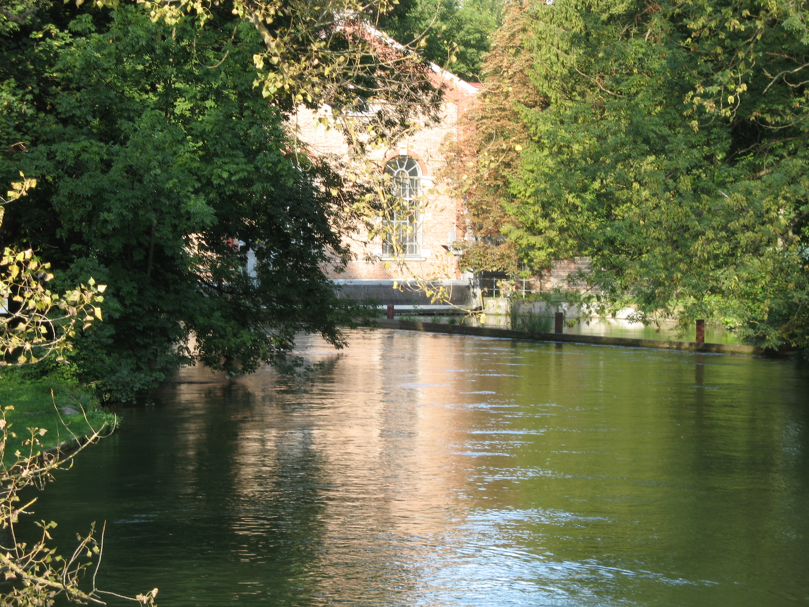 Tivoli-Kraftwerk in munich